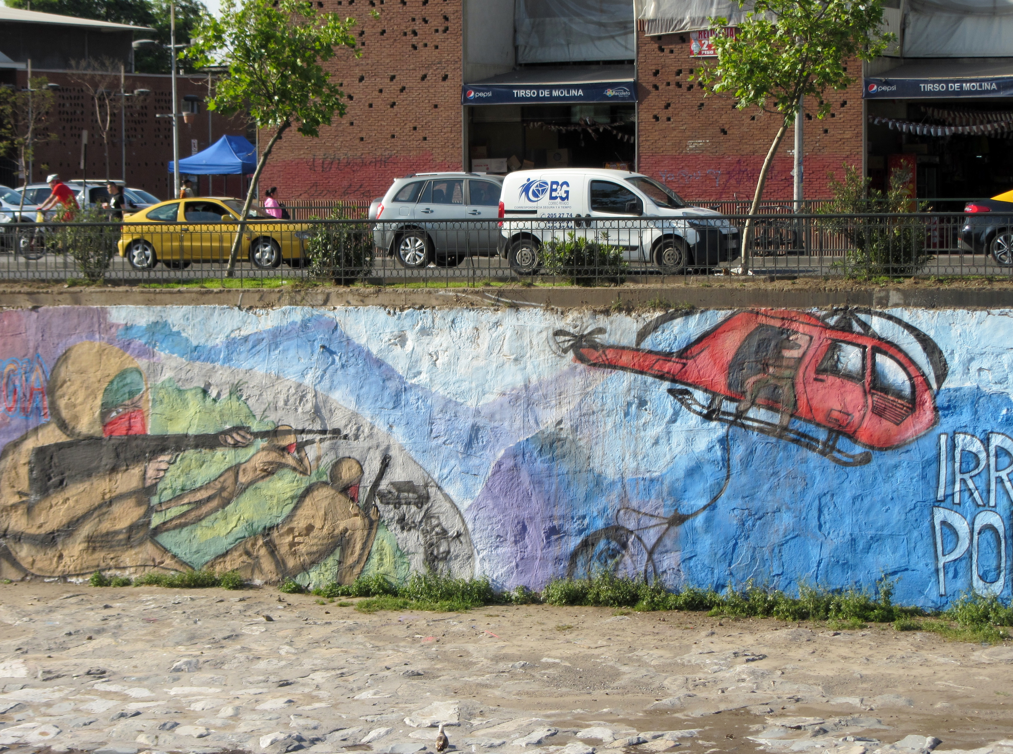 Murales pintados en homenaje al Frente Patriótico Manuel Rodríguez en la ribera norte del río Mapocho, a la altura del mercado de abastos Tirso de Molina, entre el puente de la Paz y el de Los Carros (peatonal).